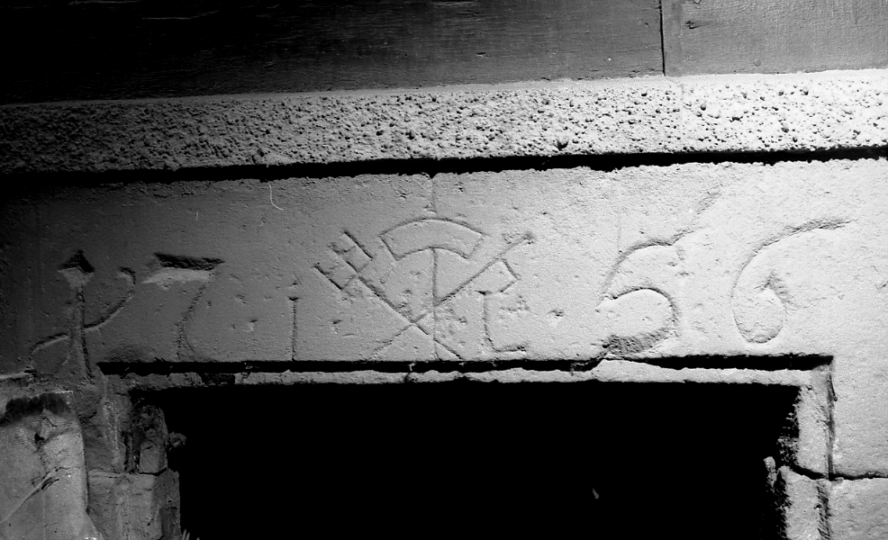 Türsturz am Bierkeller Kirchplatz 2 in Michelstadt; bezeichnet 1756, dem Handwerkszeichen eines Bierbrauers und den Initialen I. L(ehr).